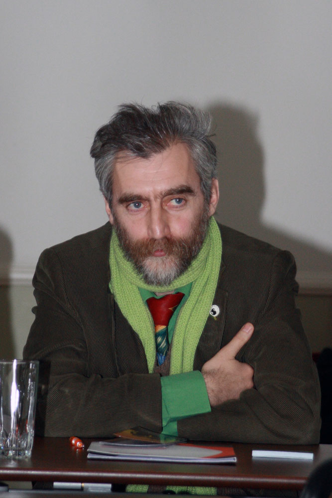 Aleksei Lotman debatil "Kas 16-aastased noored peaksid saama valida või mitte?" Kuressaares